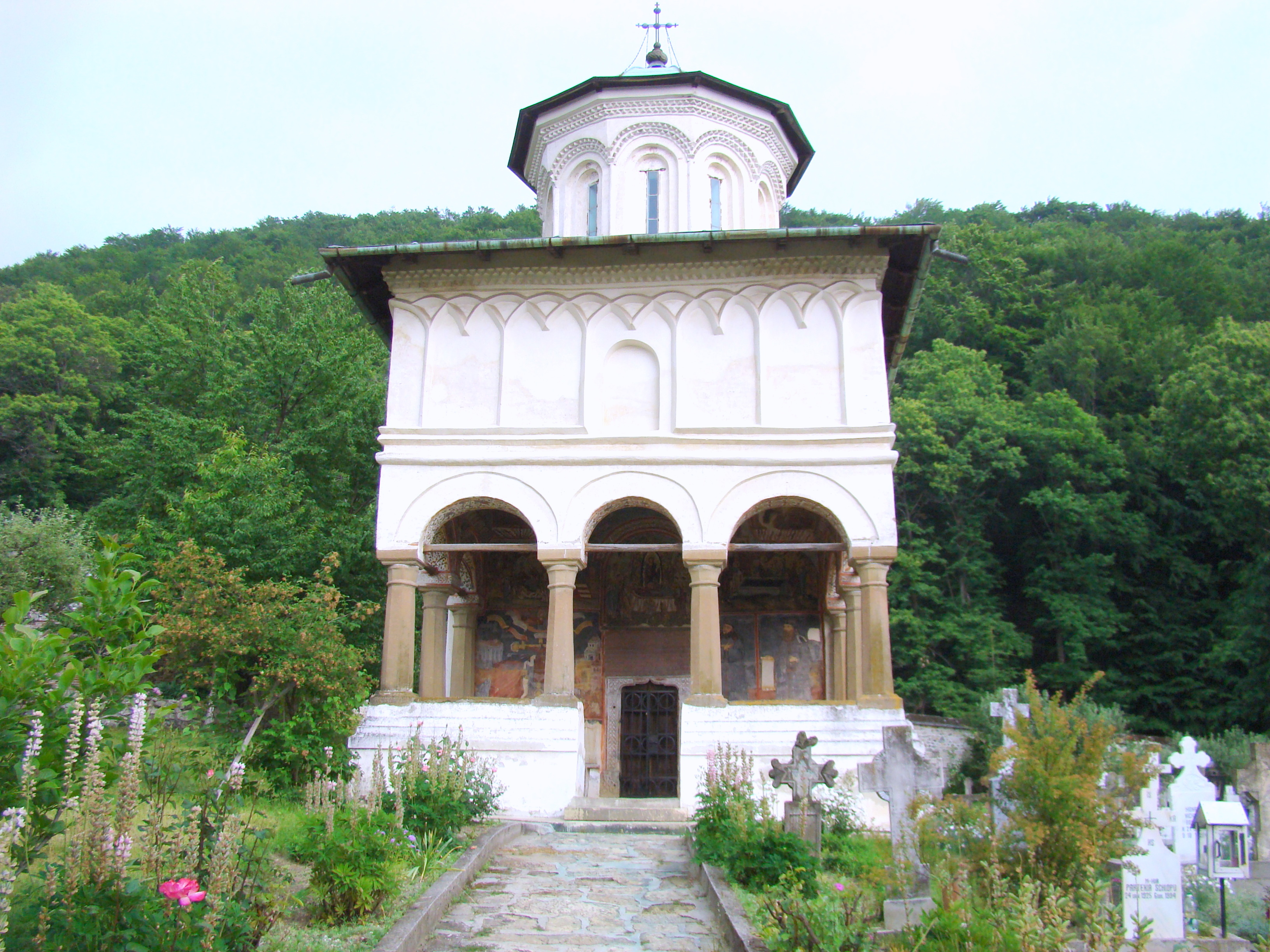 Bolnița „Adormirea Maicii Domnului”, Mănăstirea Hurezi, Vâlcea